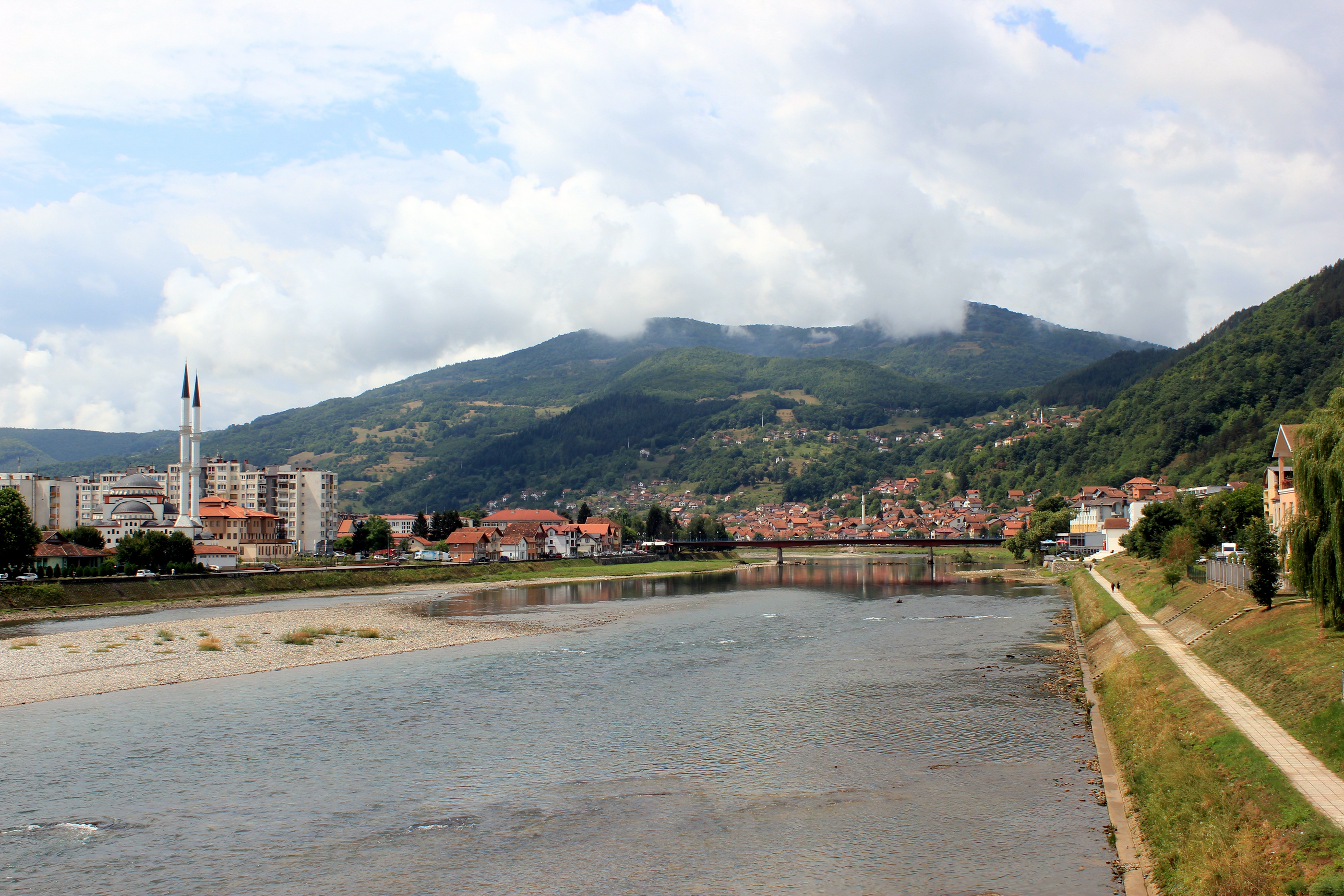 Die Drina in Goražde, Bosnien und Herzegowina.